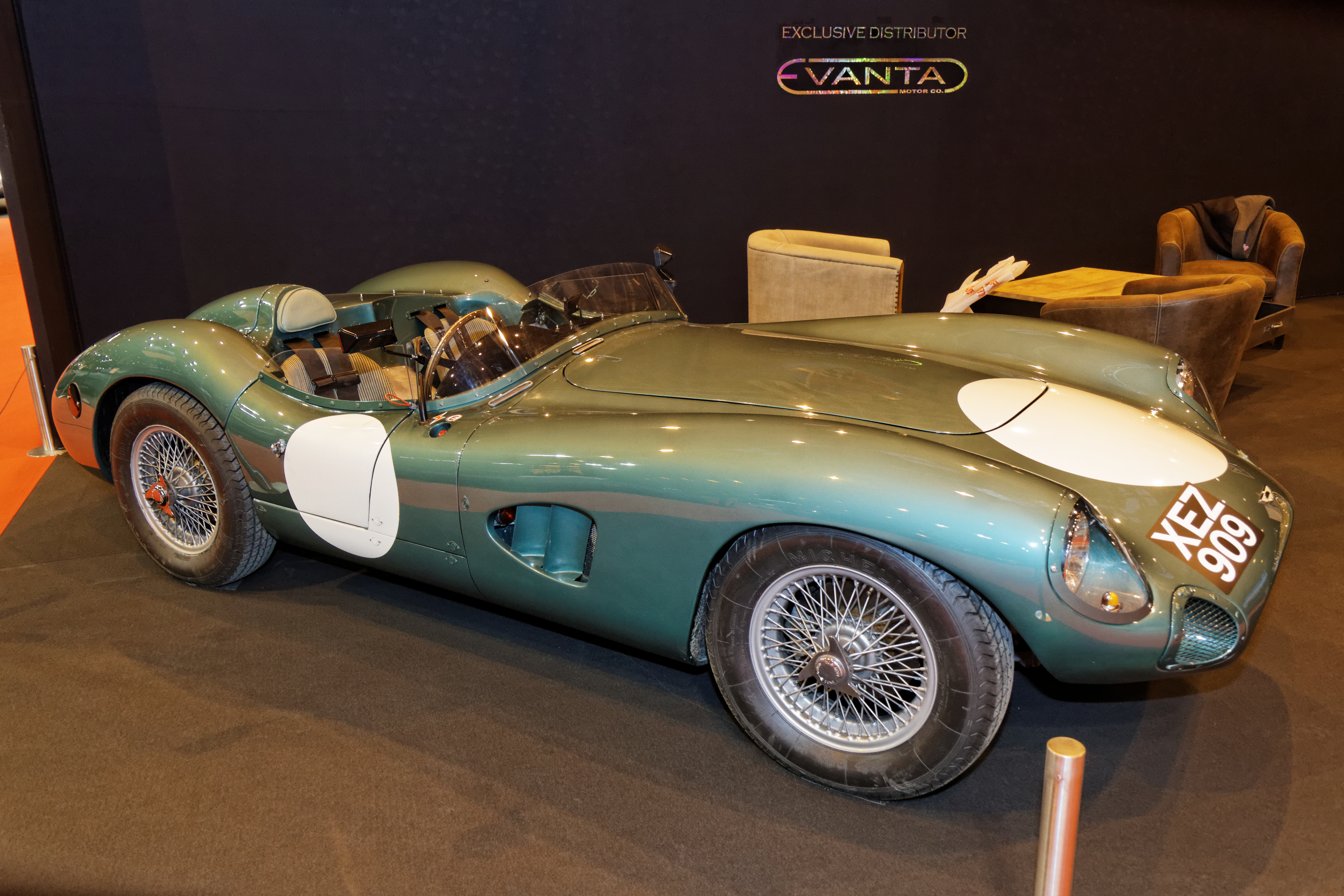 L'Aston Martin DBR 1 exposée lors du salon Retromobile 2014.